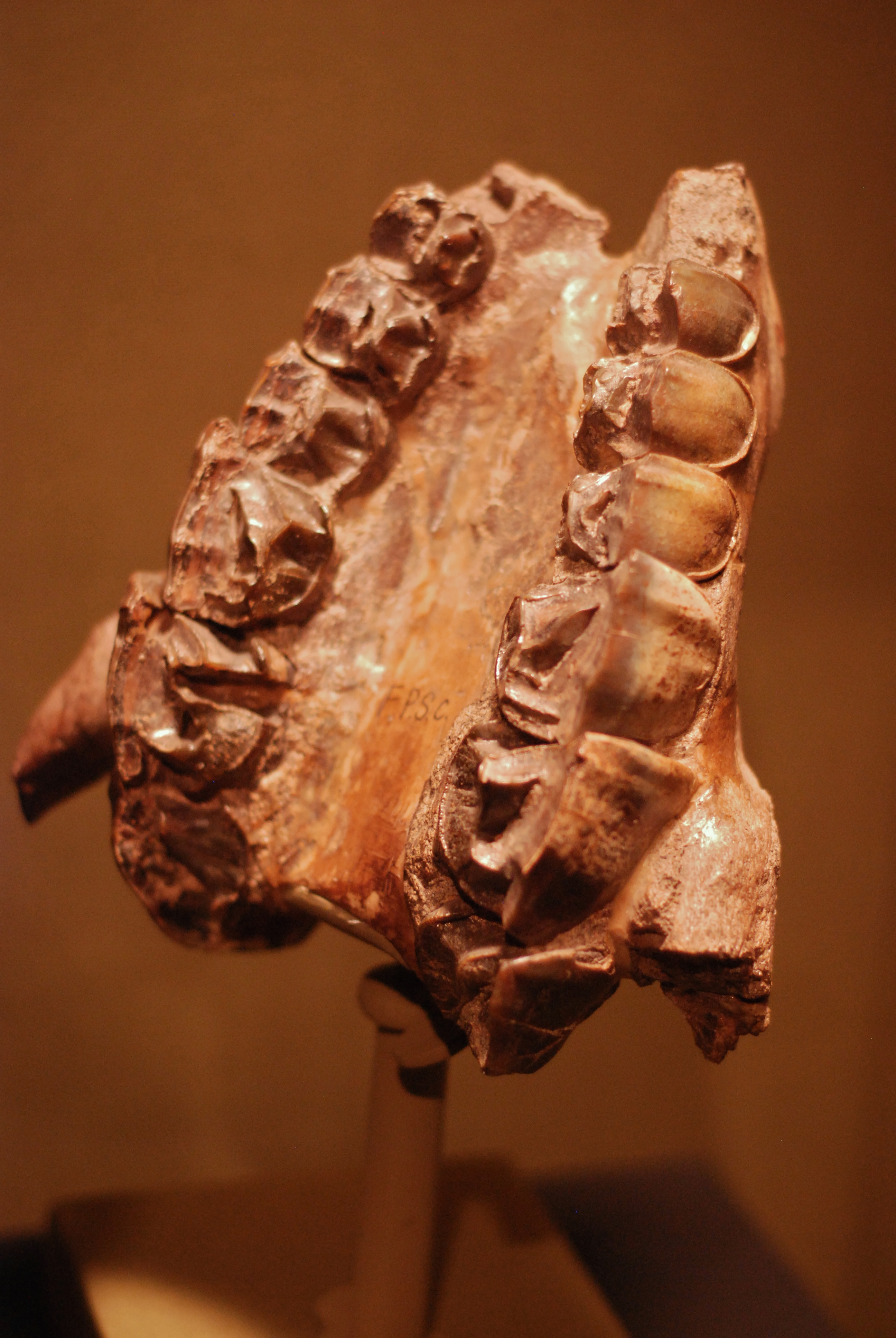 Paladar fósil. Homaledotherium cunninghanni. Mioceno Santa Cruz, Argentina.